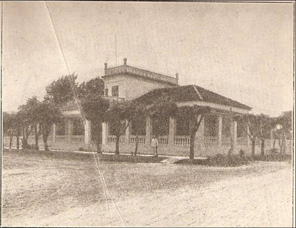 Casa del Gobernador Territorial de Formosa. Hoy el Museo Histórico Regional Juan Pablo Duffaurd.